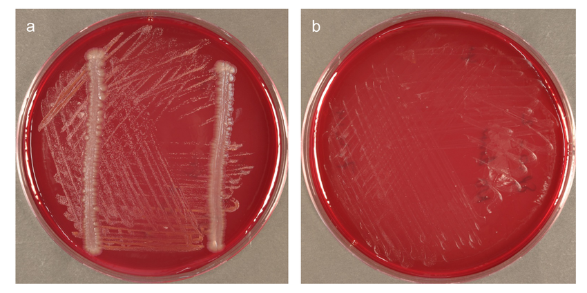 Filo Chloroflexi isolado Anaerolineae bactéria HOT-439